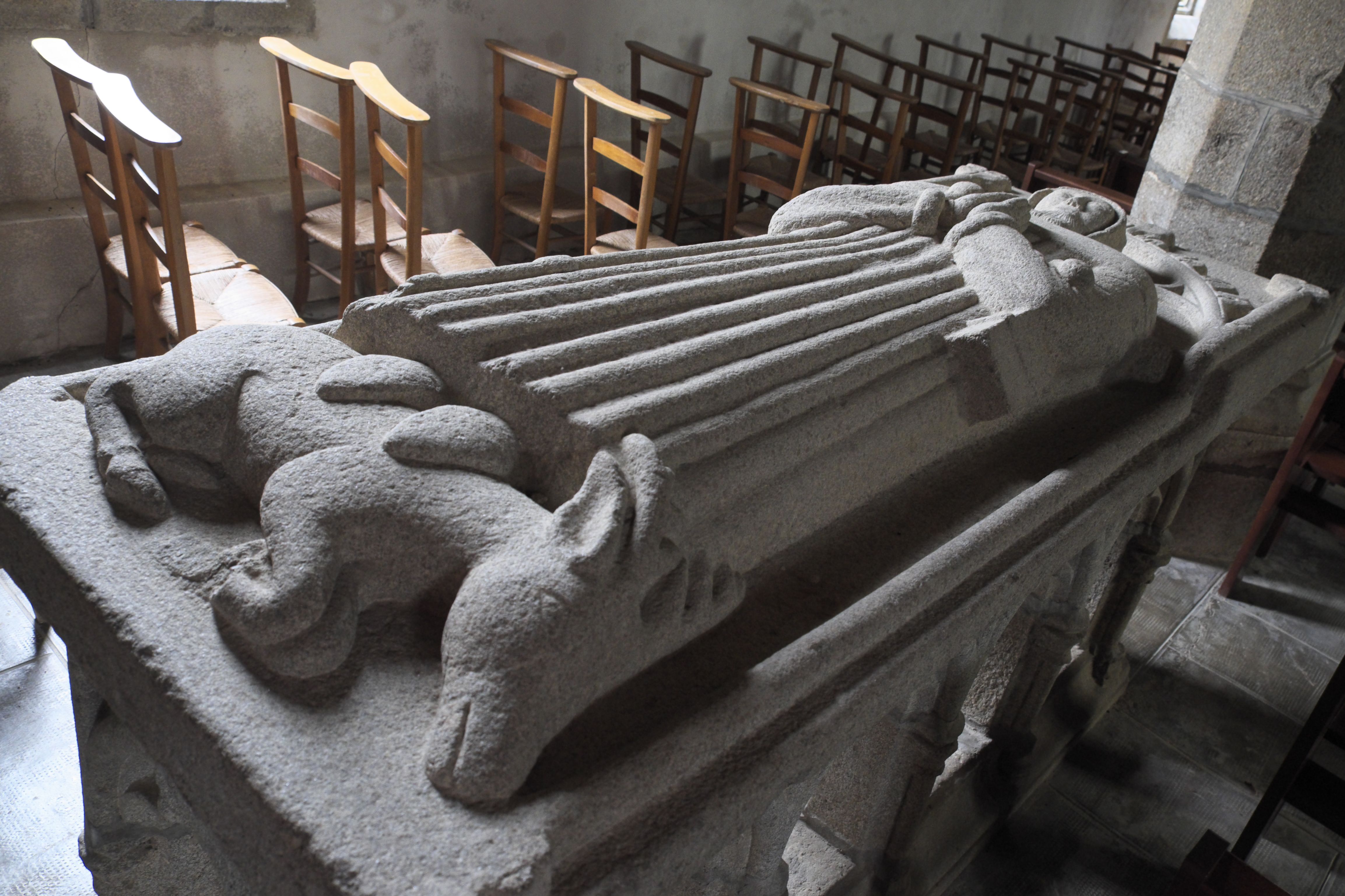 Katholische Kirche Saint-Edern in Lannédern im Département Finistère (Region Bretagne/Frankreich), Grab mit der Liegefigur des heiligen Edern aus dem 14. Jahrhundert